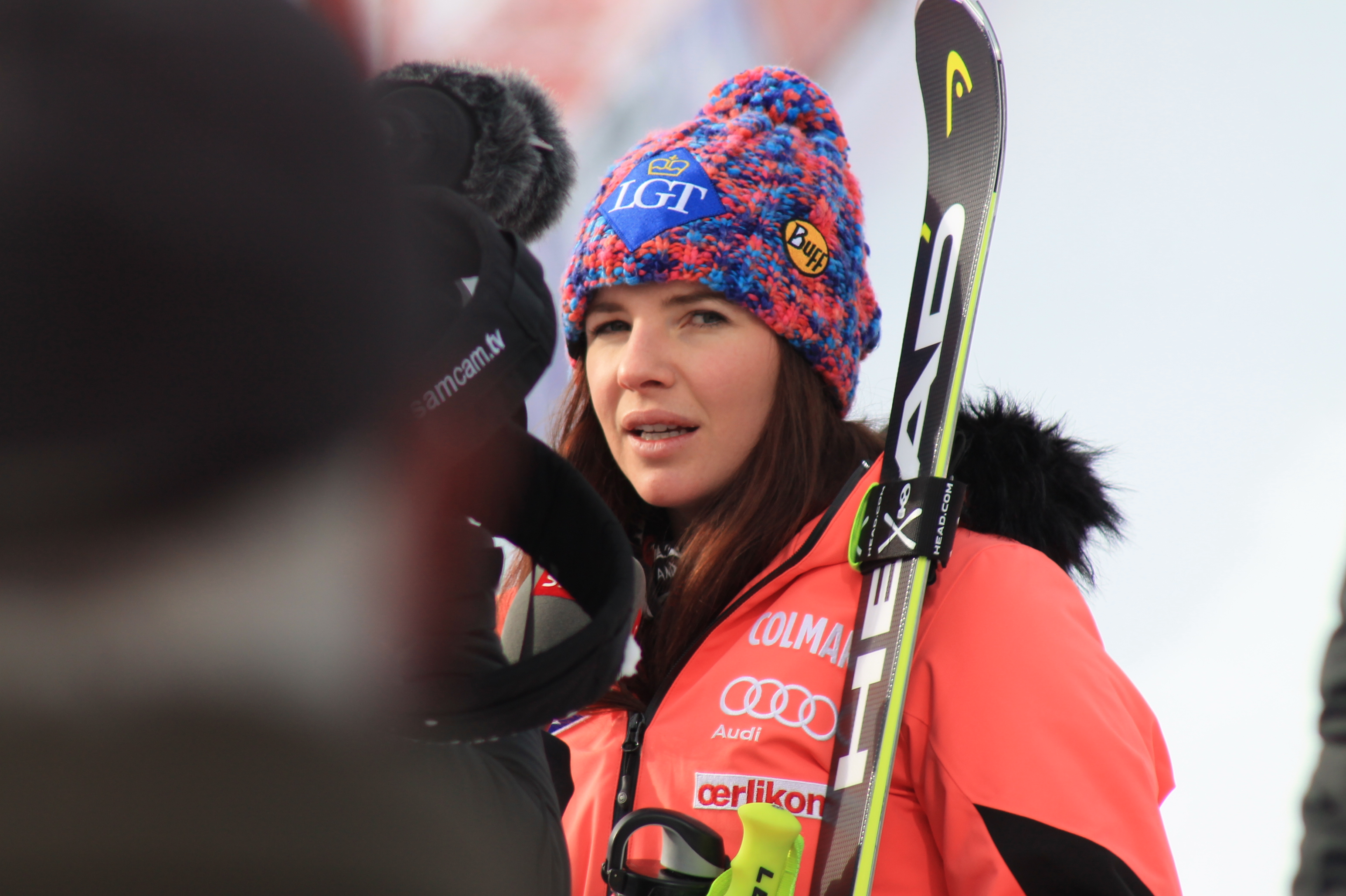 Я долго ловил Тину, 16 декабря 2017 года она упала на трассе, я не смог поймать и сфоткать её. Зато вечером мне это удалось. А вот 17 декабря она была доброжелательна. Фоткалась много и в общем я был доволен. Она заняла второе место, я был счастлив.